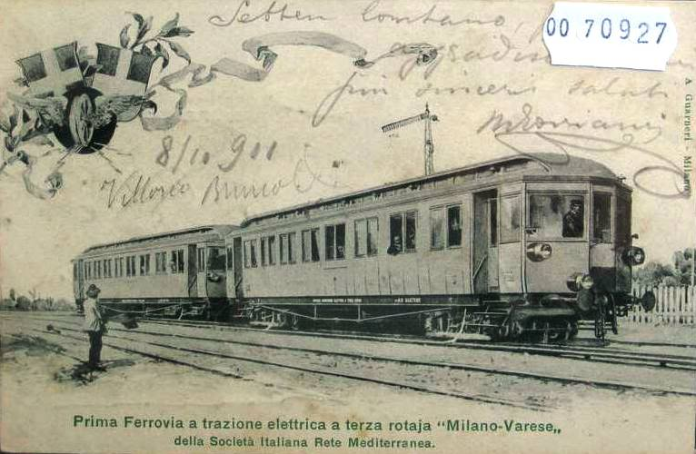 Cartolina commemorativa dell'inaugurazione dell'esercizio a trazione elettrica (con automotrici a terza rotaia) sulla linea Milano-Varese, ad opera della Rete Mediterranea.